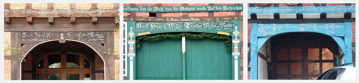 Torbalken an Häusern des Typs Niedersachsenhaus (in der Wedemark)